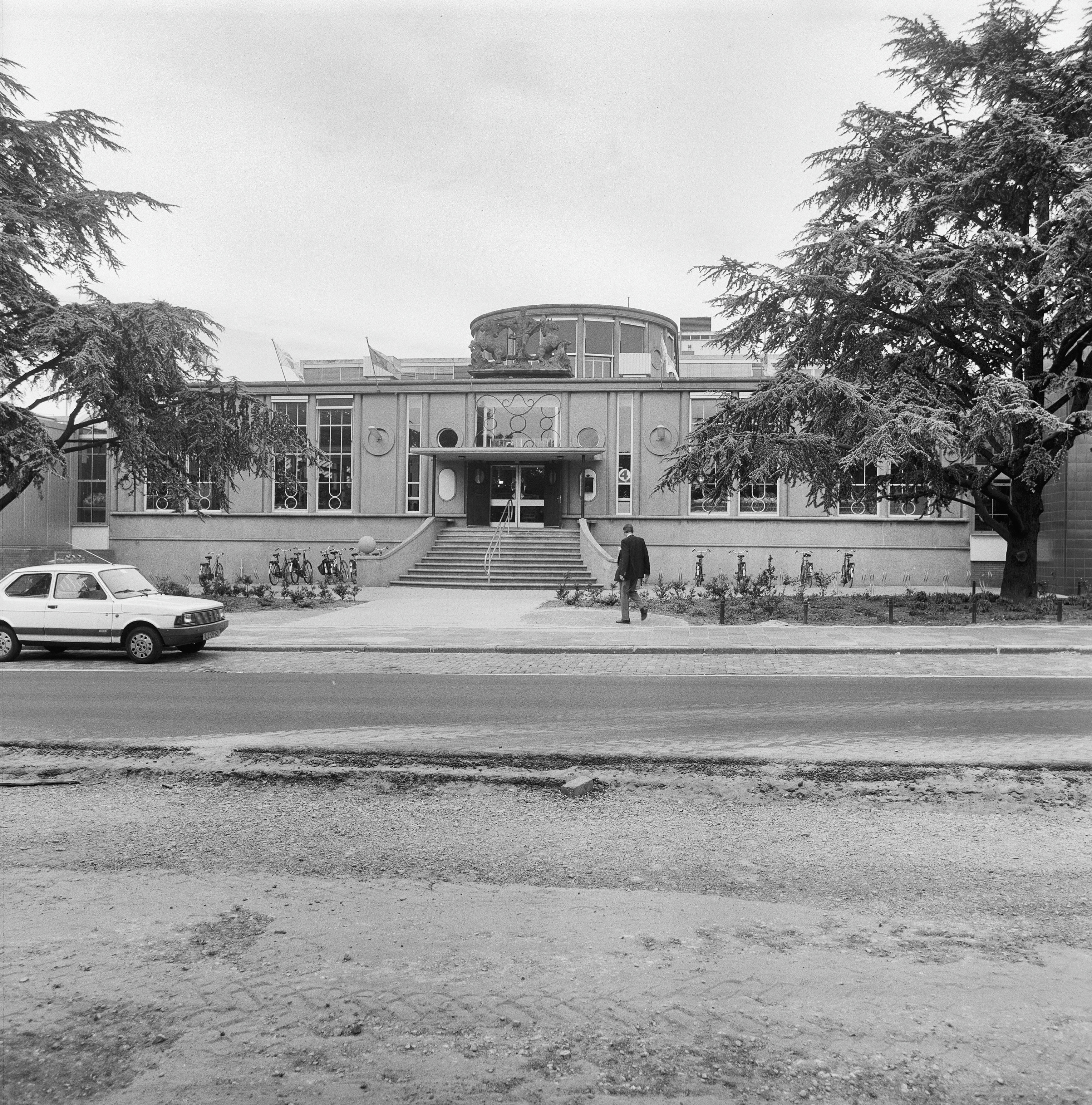 VOORMALIG GEBOUW DE HOLLAND: Exterieur VOORGEVEL